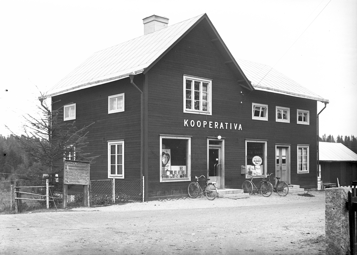 Kooperativa Konsumaffären i Västansjö, 1950-tal